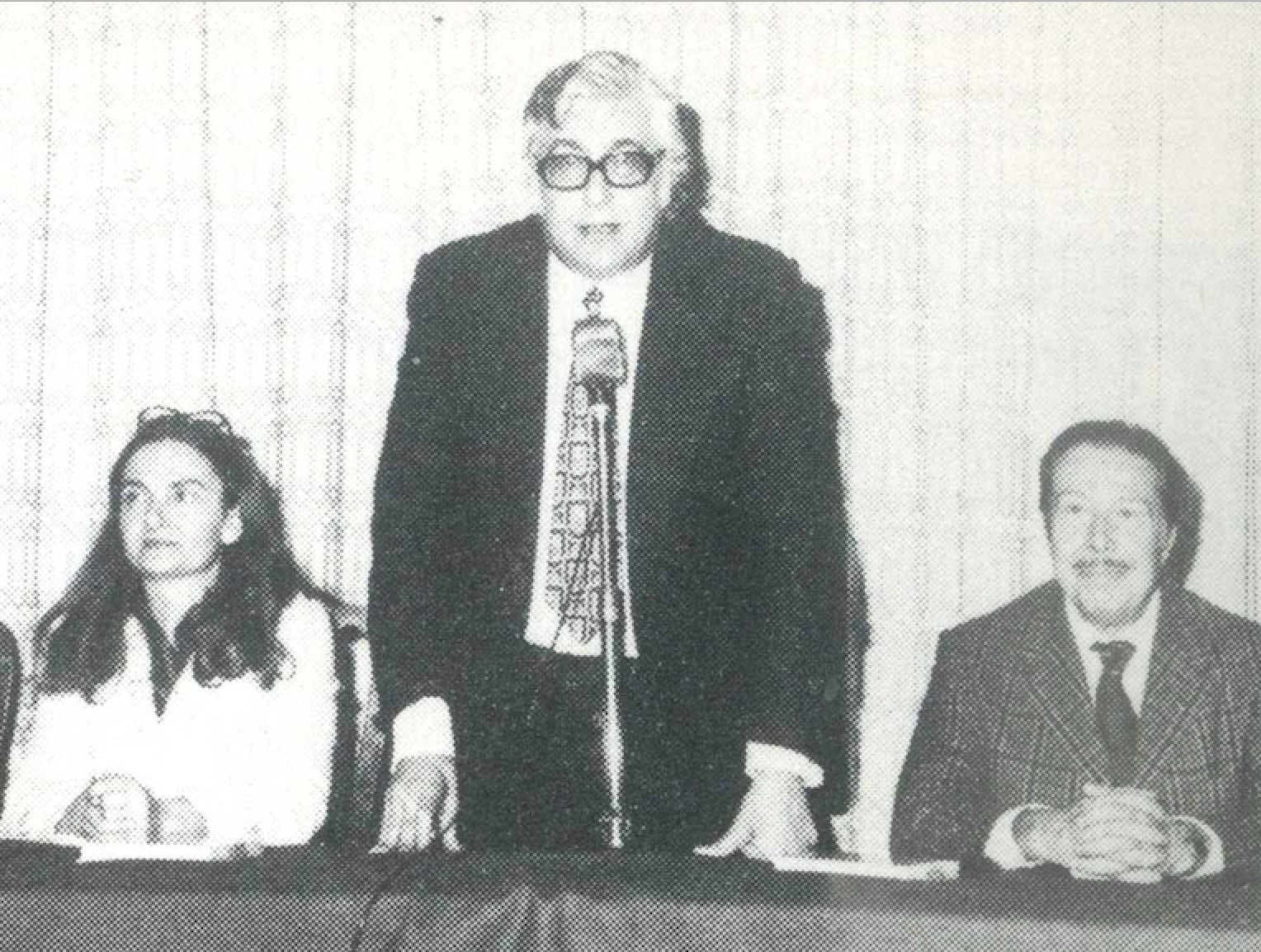 Roma, 1972. Lo scrittore Luigi Silori, in piedi, con la scrittrice Rossana Ombres e il presidente del CONI Giulio Onesti